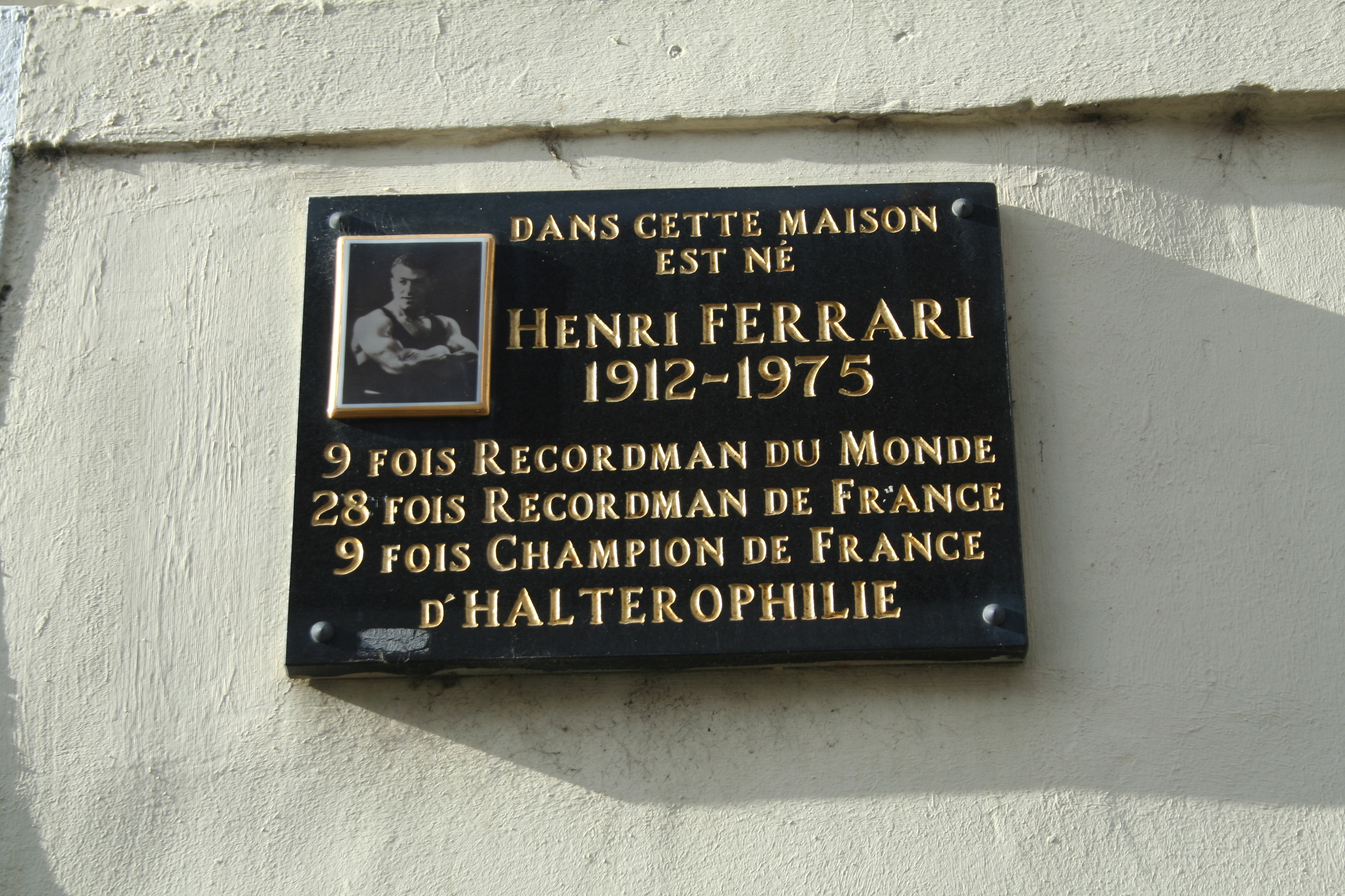 Frontignan (Hérault) - Rue du Port - plaque sur la maison où est né Henri Ferrari (1912-1975), haltérophile.